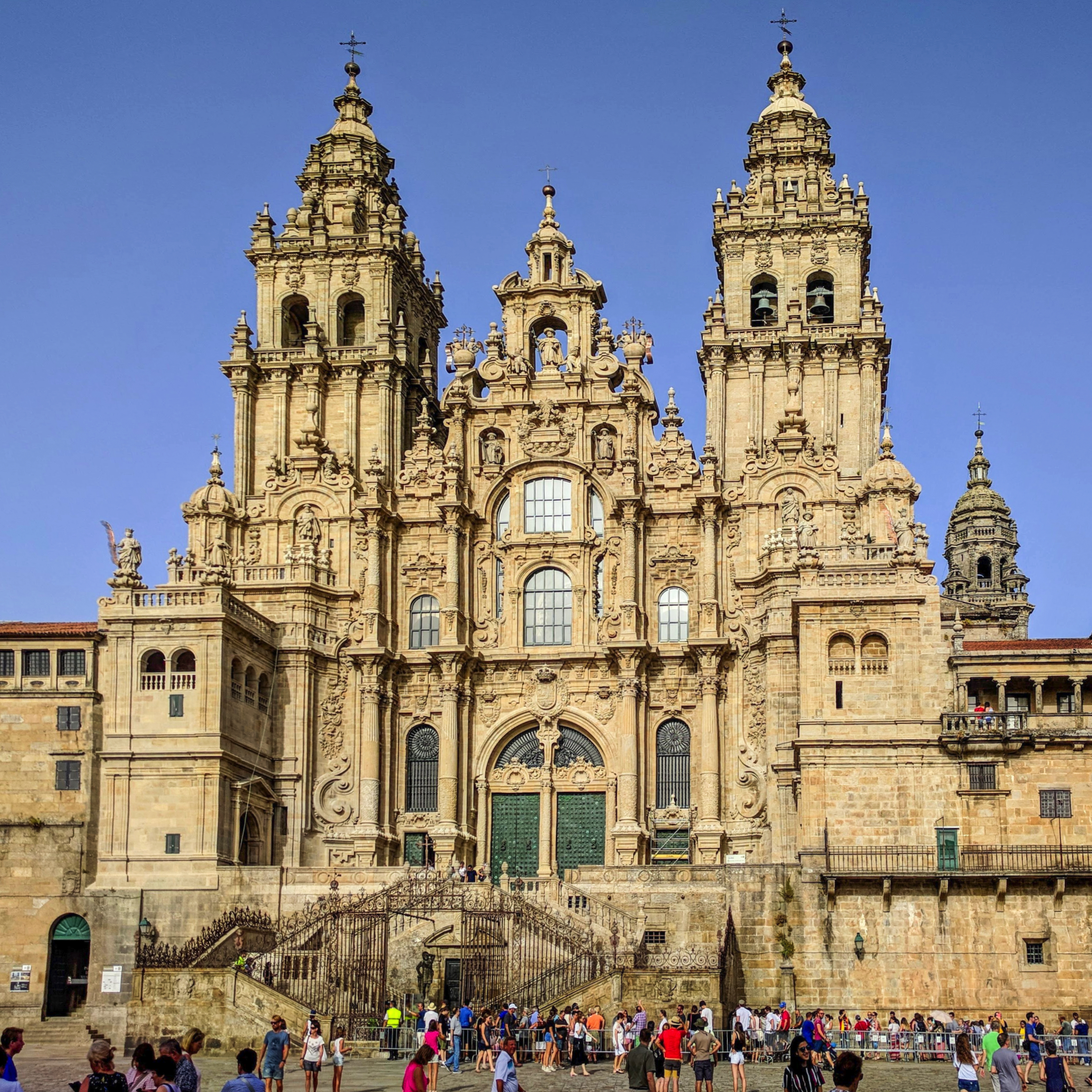 Imagen en agosto de 2018 de la fachada principal de la catedral de Santiago de Compostela.